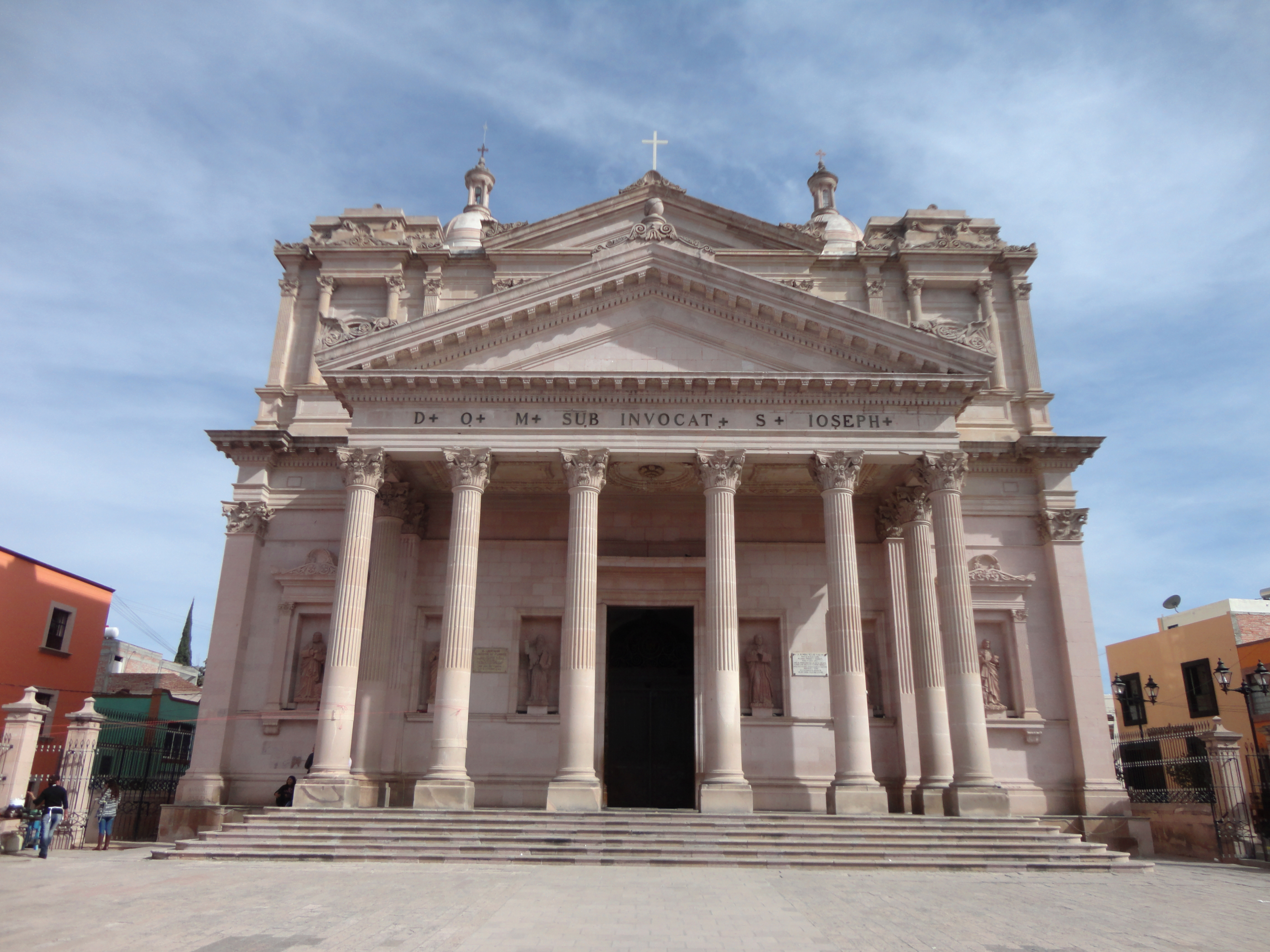 Parroquia de San José - San José Iturbide, Guanajuato, México.